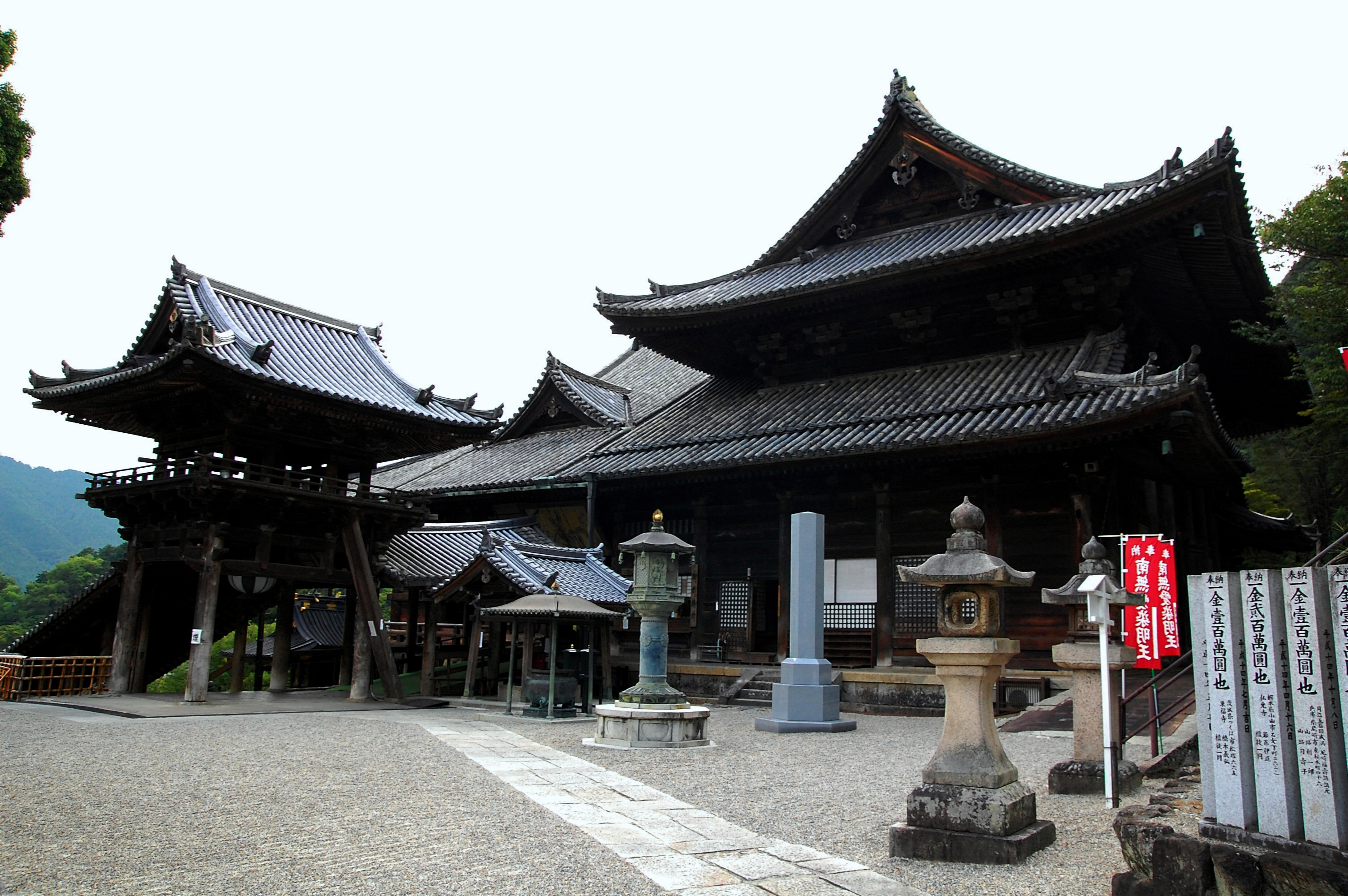 奈良県桜井市 豊山神楽院長谷寺